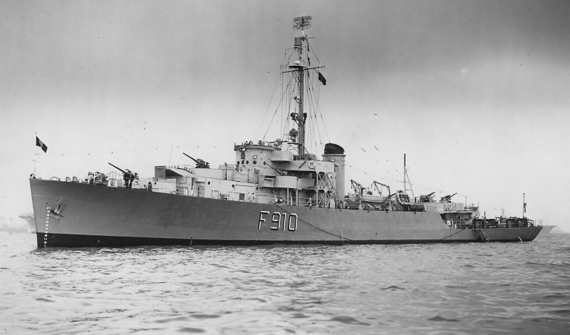 La frégate de la Force navale belge : Lieutenant ter Zee Victor Billet (F910) ex-USS Sheboygan (PF-57)